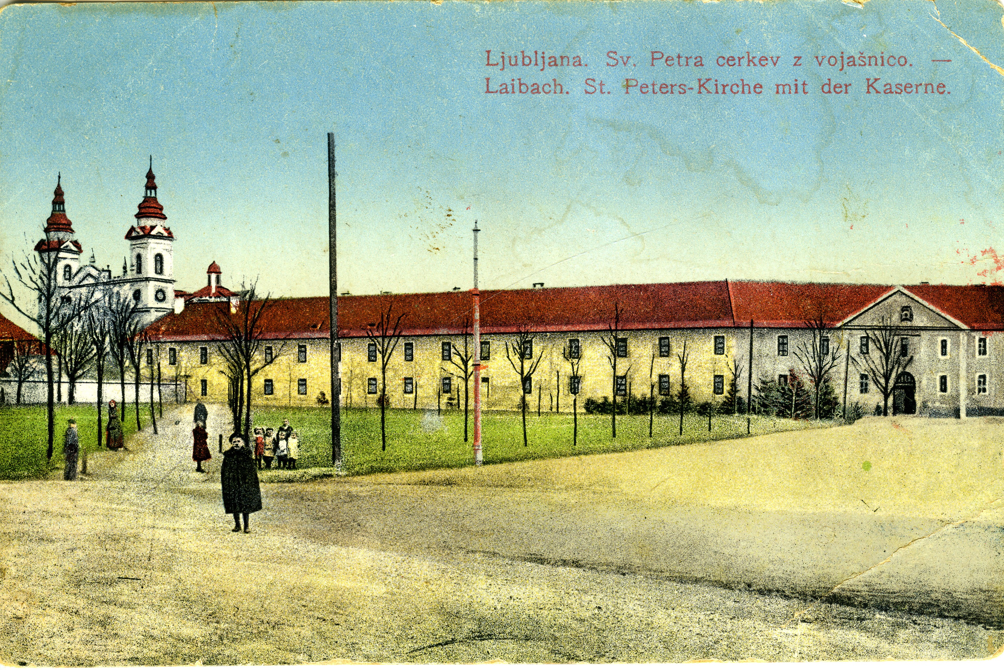 Cerkev Sv. Petra in vojašnica.